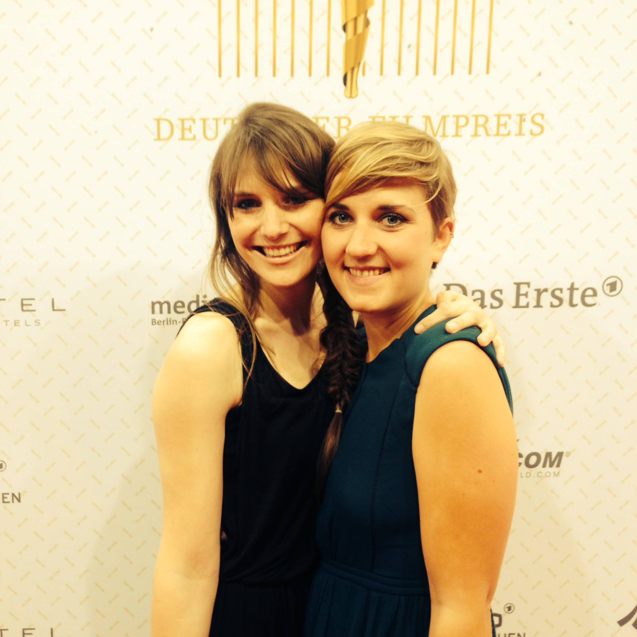 Helena Hufnagel (links) und Melina Hartmann (rechts) auf dem Deutschen Filmpreis